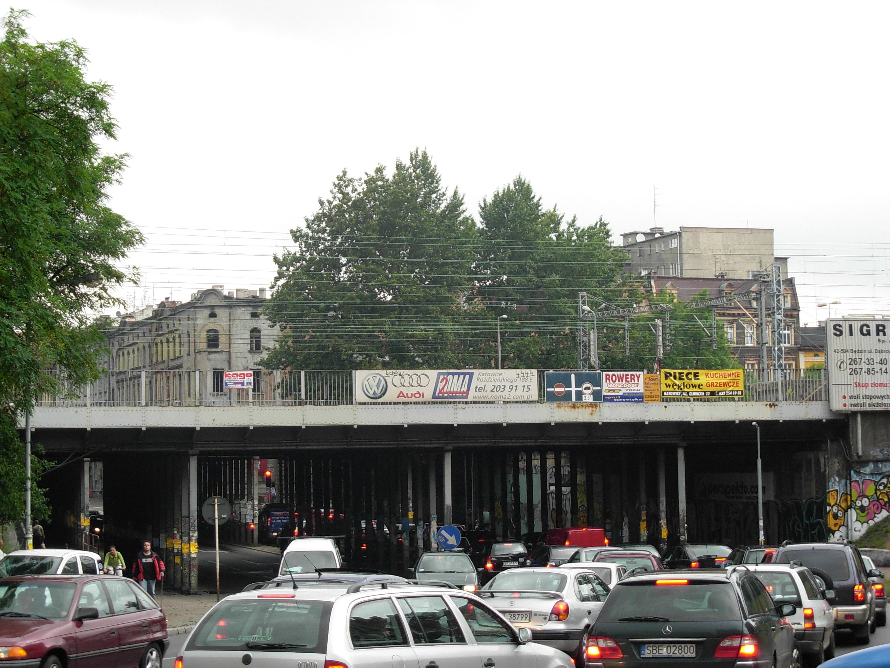 Katowice